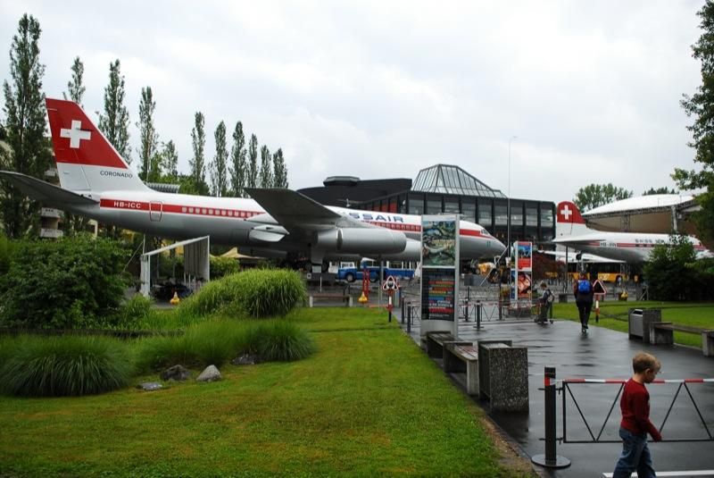 Swiss Transport Museum, Lucerne